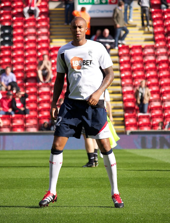 Zat Knight